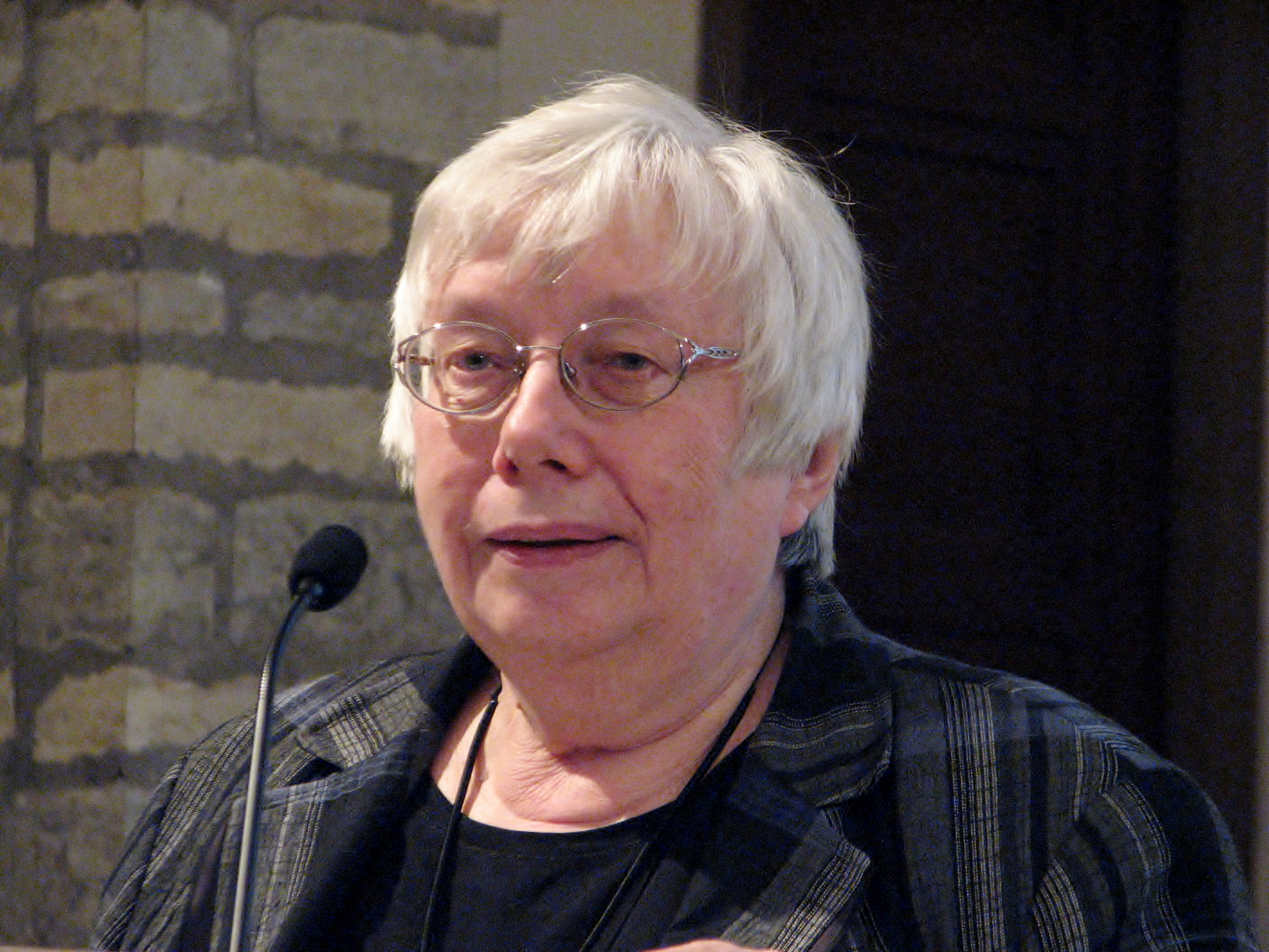 Marju Lauristinile andis Eesti Raamatukoguhoidjate Ühing autasu Raamatukogude Sõber 2013